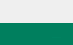 Esta es la bandera del cantón Pedro Vicente Maldonado de la provincia de Pichincha, en Ecuador